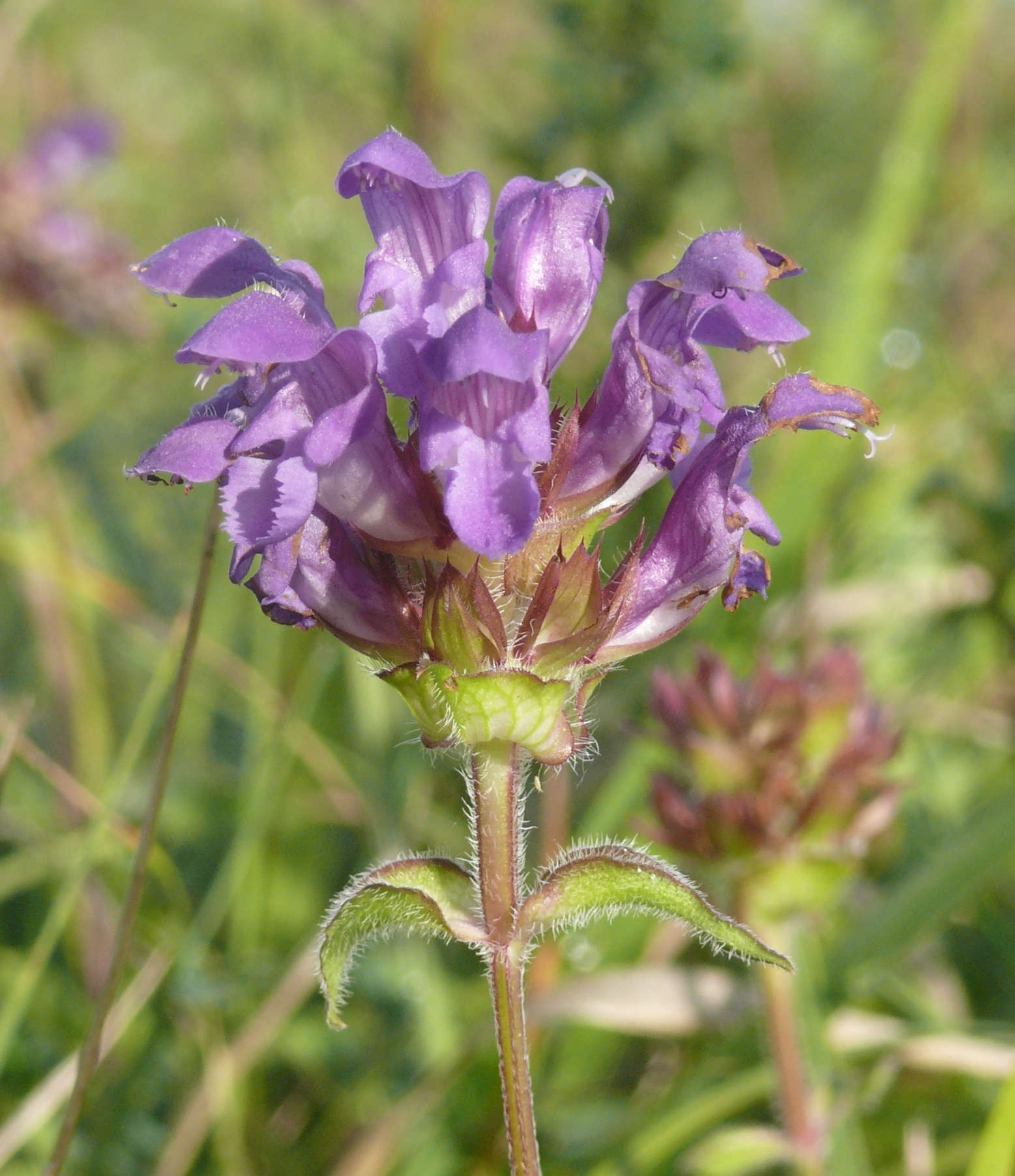 Prunella grandiflora, Taubergrund, Deutschland